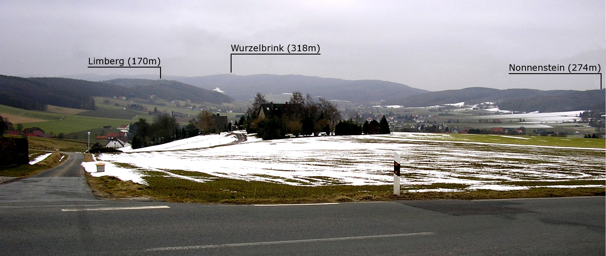 Eggetal mit Börninghausen (Stadt Preußisch Oldendorf, Kreis Minden-Lübbecke) im Talgrund. Aufnahme erfolgte von Büscherheide (Stadt Bad Essen, Landkreis Osnabrück) aus. Blickrichtung nach Osten. Von links nach rechts (von Nord nach Süd) sind folgende Berge markiert: Limberg, Wurzelbrink (zweithöchster Berg des Wiehengebirges) und der Nonnenstein.